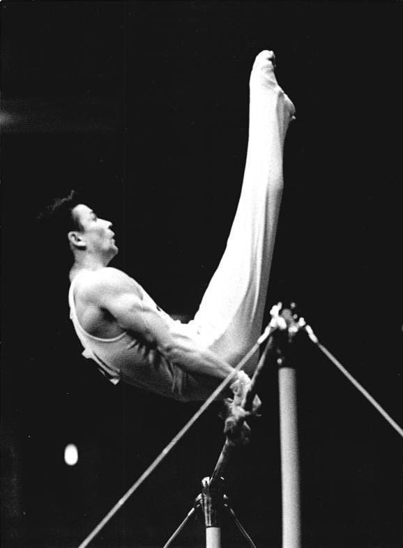 Zentralbild-Schaar-28.10.70-ma- Ljubljana (Jugoslawien) XVII. Weltmeisterschaften im Turnen- Der Leipziger DHfK-Sportler Klaus Köste errang beim Gerätefinale der Männer am 27.10.70 die erste Medaille eines DDR-Turners im Einzelklassement bei Weltmeisterschaften und Olympischen Spielen. Für seine Reckübung erhielt er 9.70 Punkte, was ihm zusammen mit dem Japaner Hayata die Bronzemedaille einbrachte.